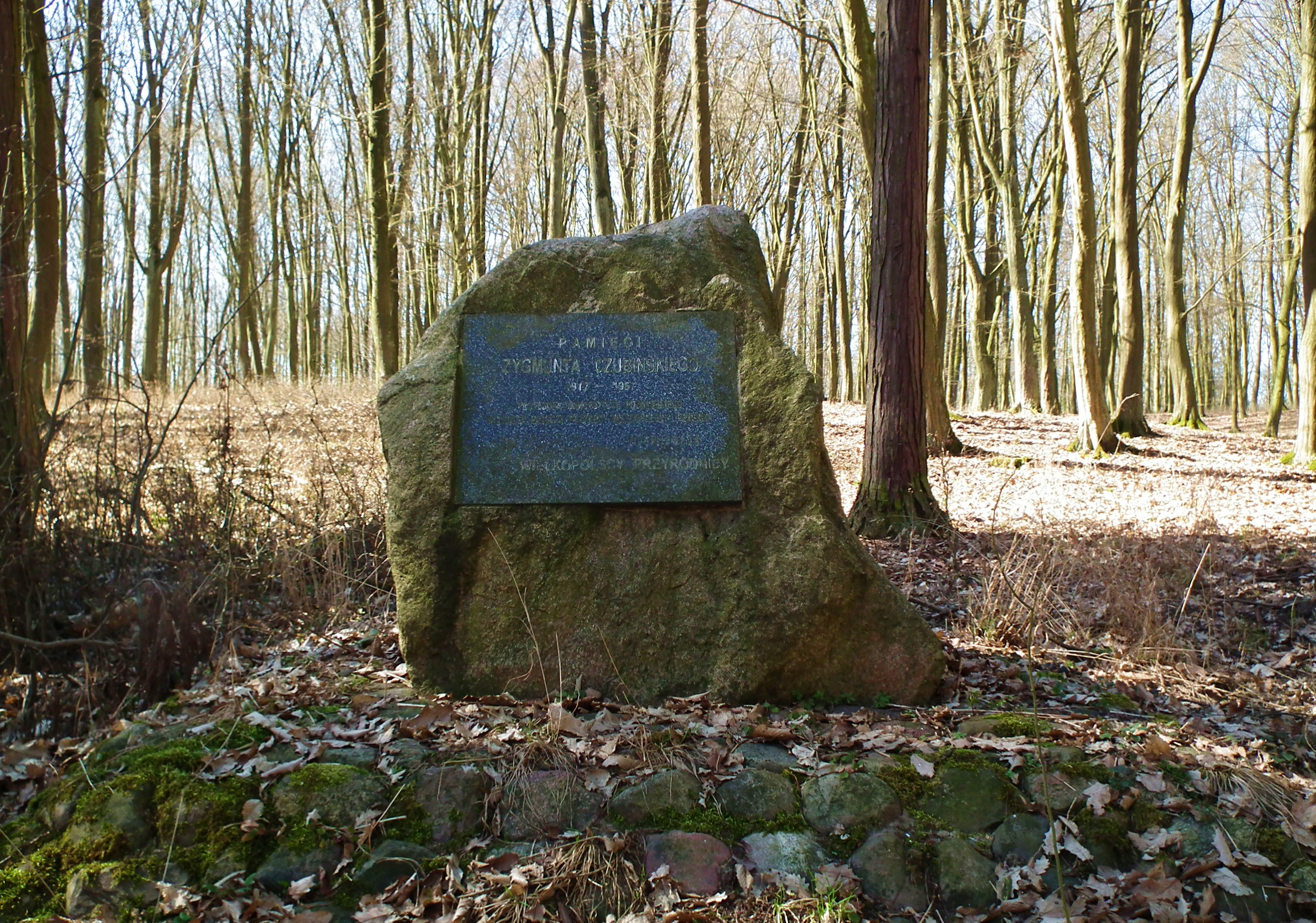 Głaz Zygmunta Czubińskiego w Parku Krajobrazowym Promno (koło jez.Drążynek).